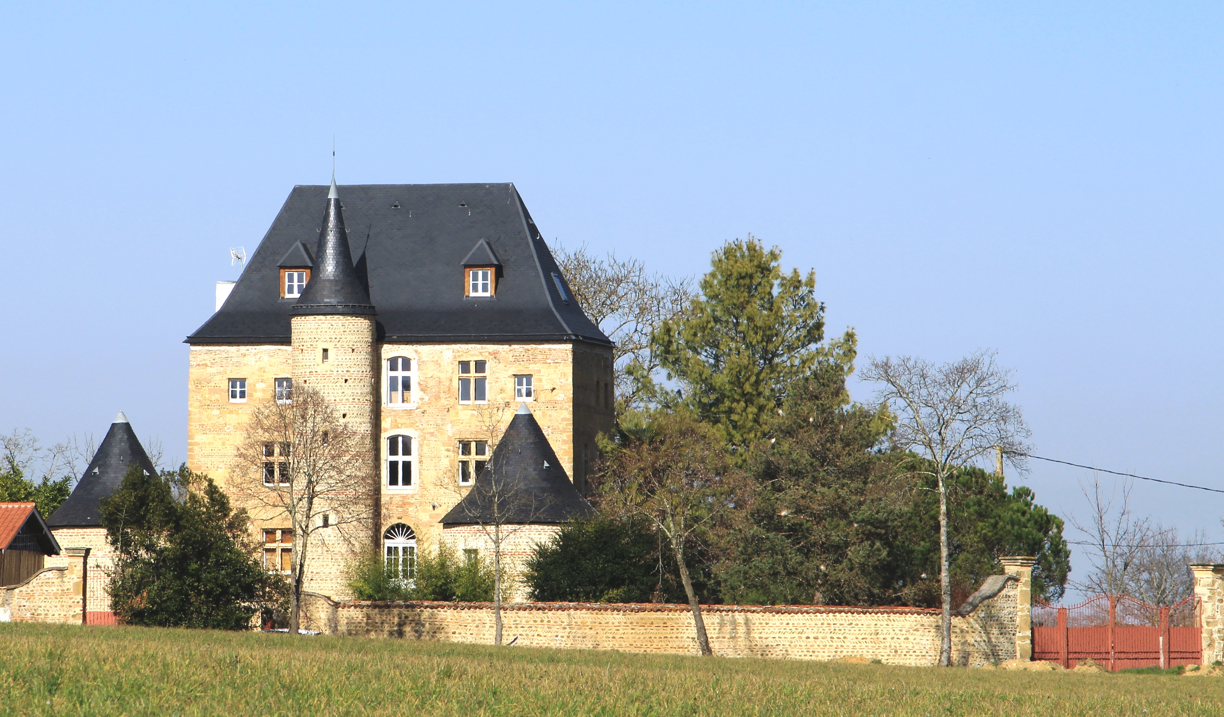 Château de Lubret-Saint-Luc (Hautes-Pyrénées)